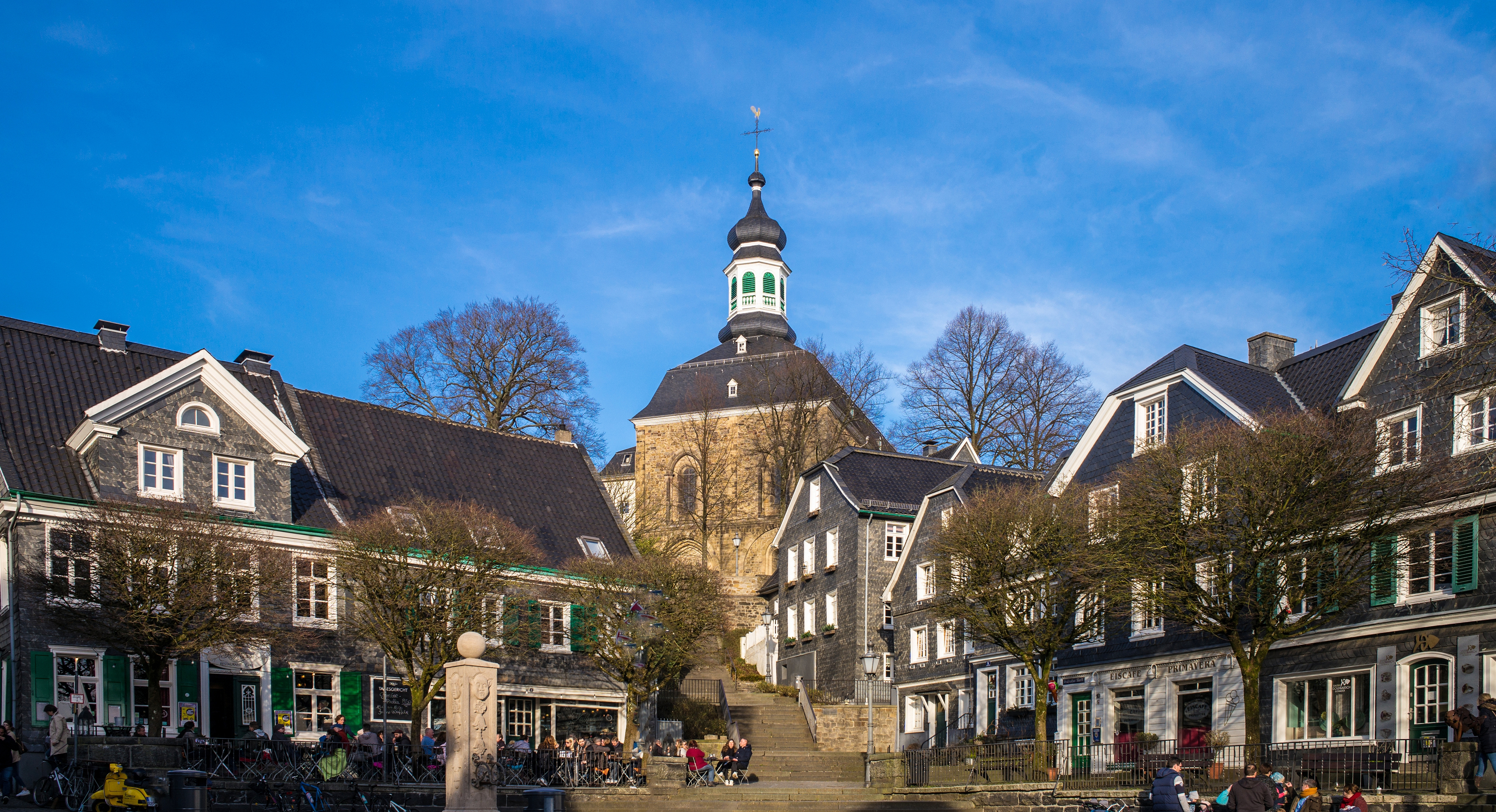 Gräfrath Marktplatz